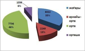 Оқырмандардың білімдері бойынша (Л.Н.Толстой атындағы Қостанай облыстық әмбебап ғылыми кітапхана)